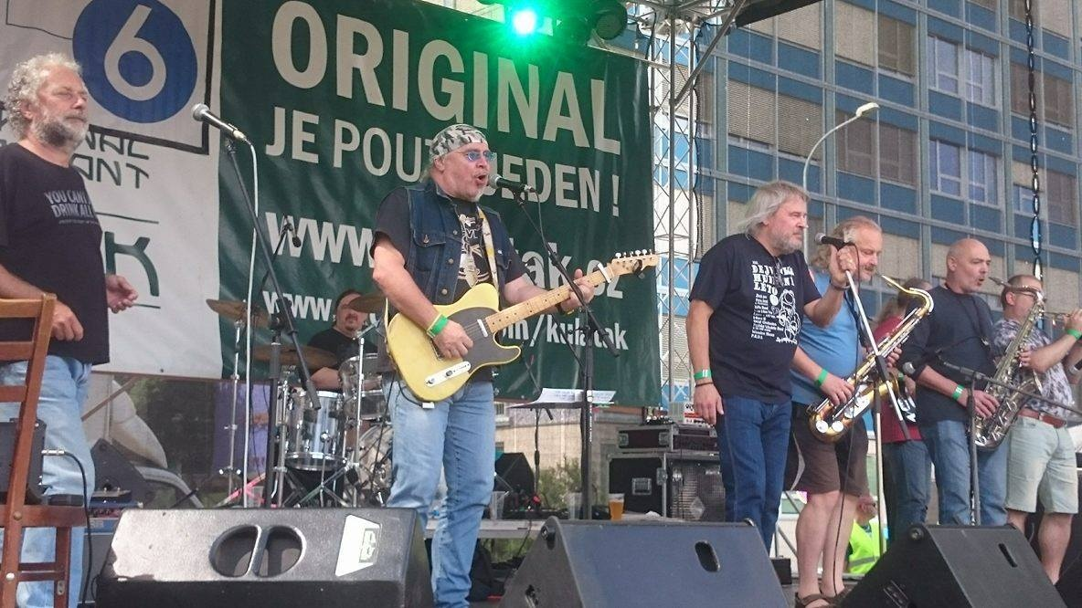 Hlava B koncertující na DEJHULE, Praha, 2016